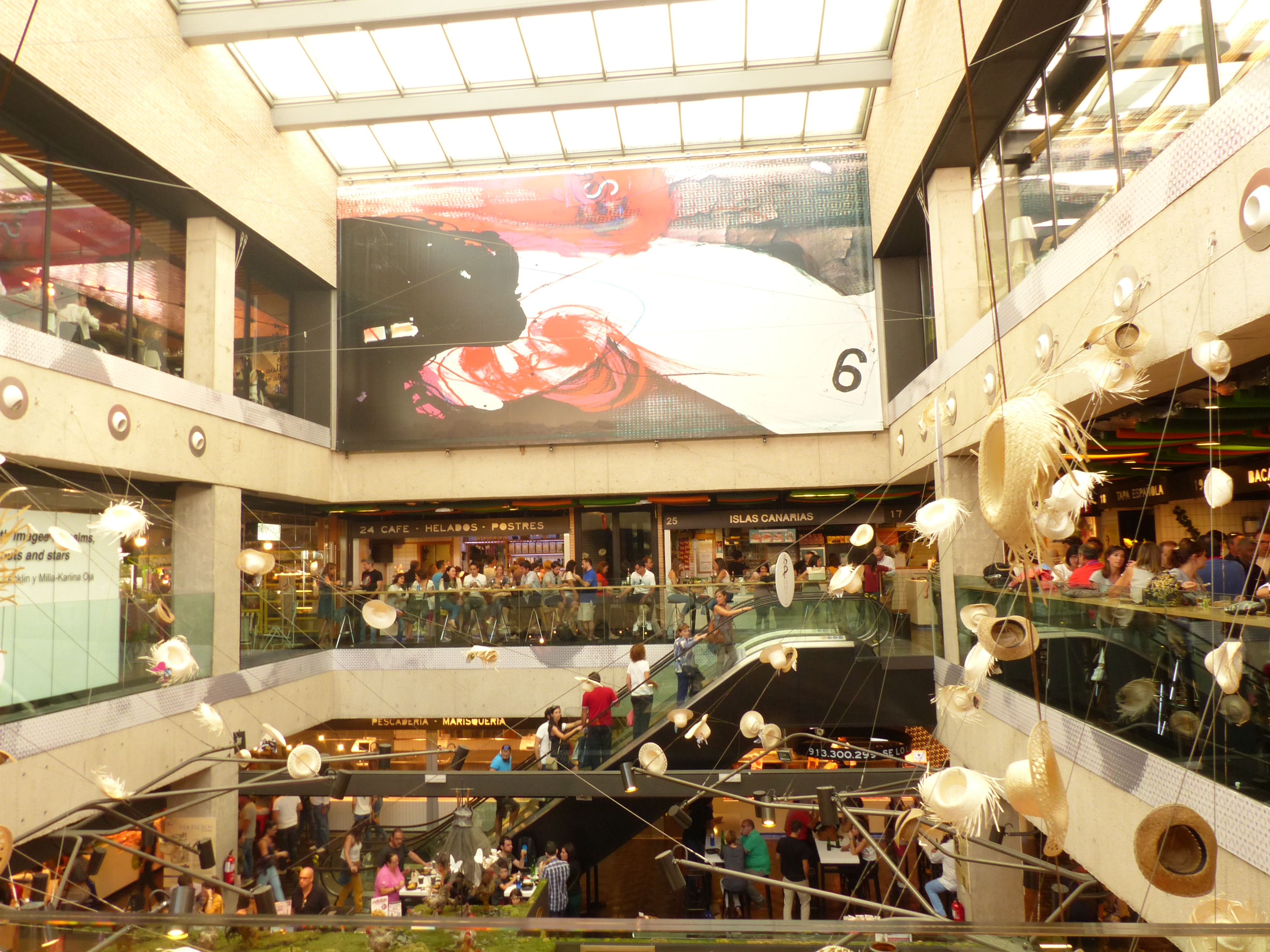 Mercado de San Antón, vita del patio interior.